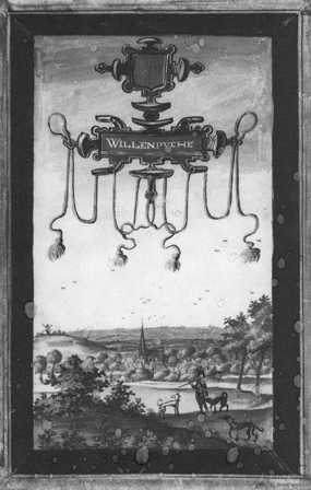 Portail du village de Willaupuis